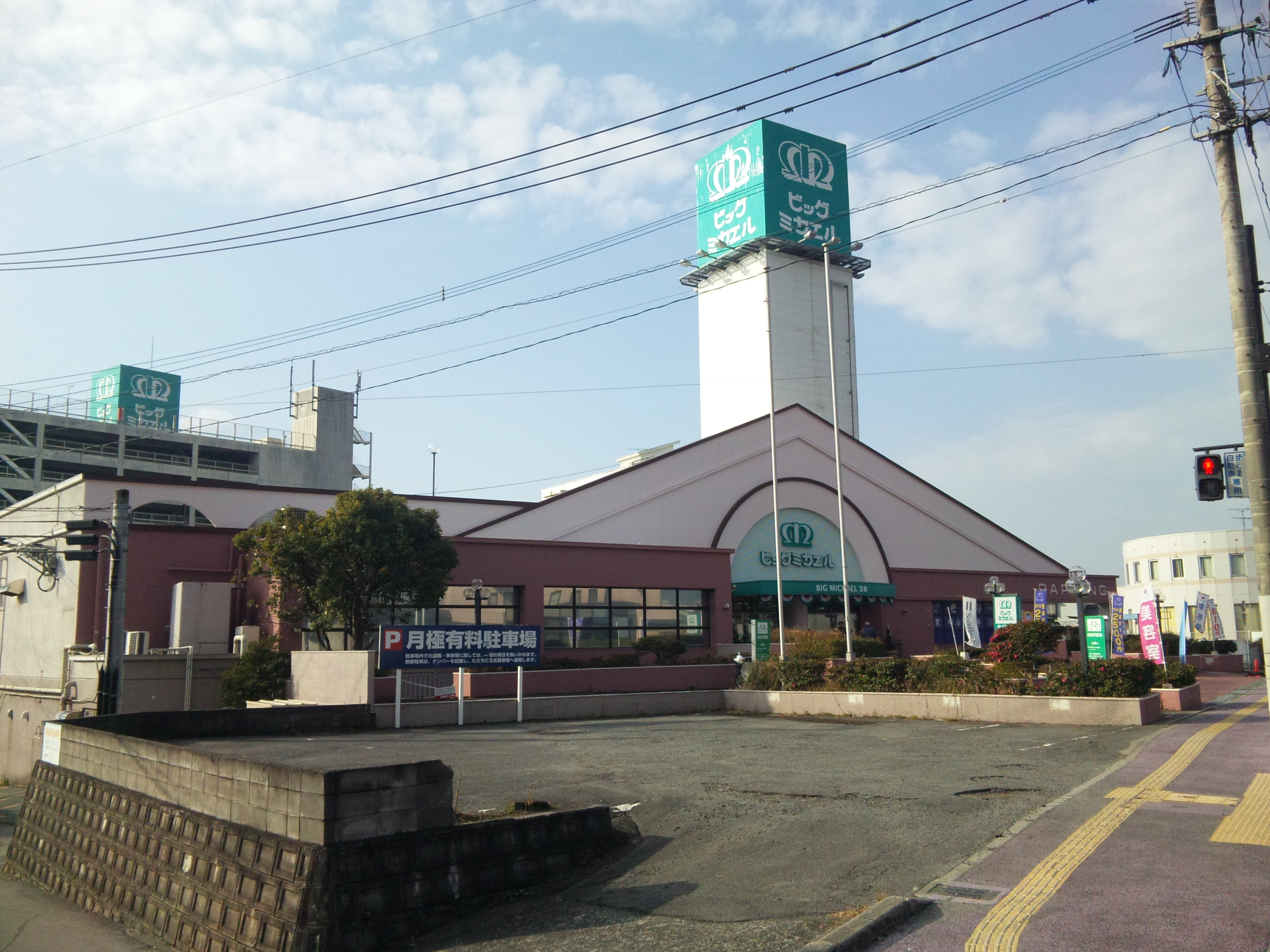 ビッグミカエル玉名店（県道側・熊本県玉名市）